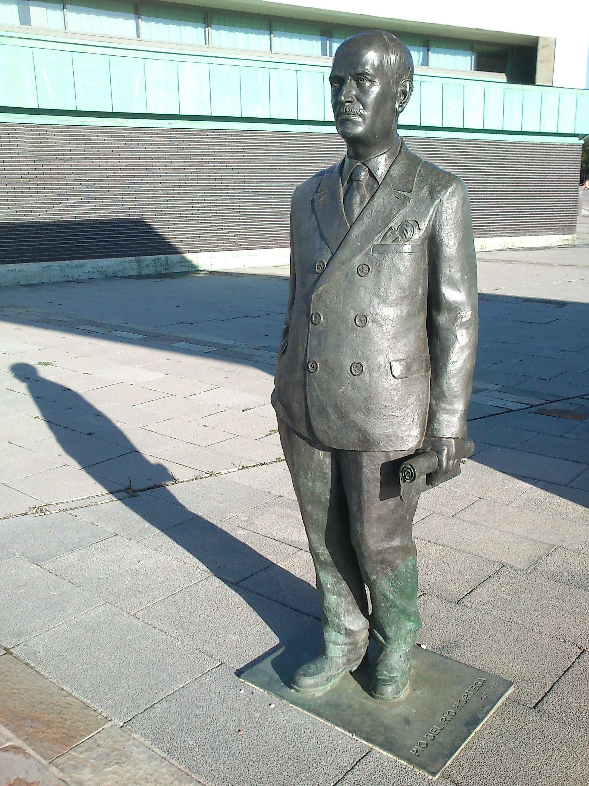 Estatua en bronce de Pío del Río Hortega a la entrada del Museo de la Ciencia de Valladolid (detalle).